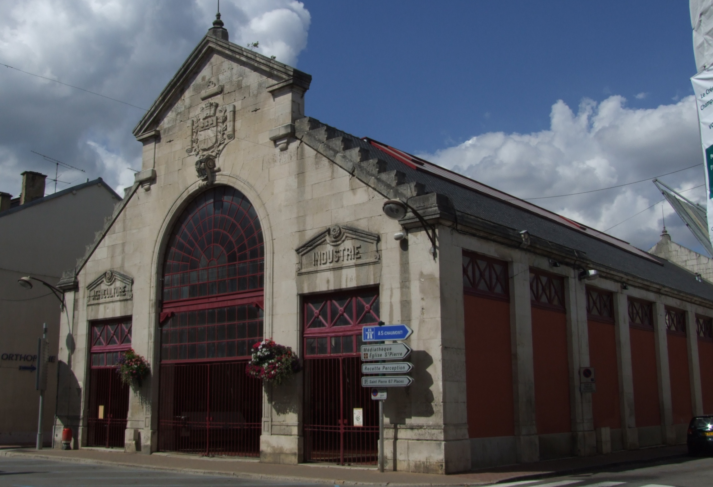 Bar-sur-Aube, Aube, Champagne-Ardennes, FRANCE